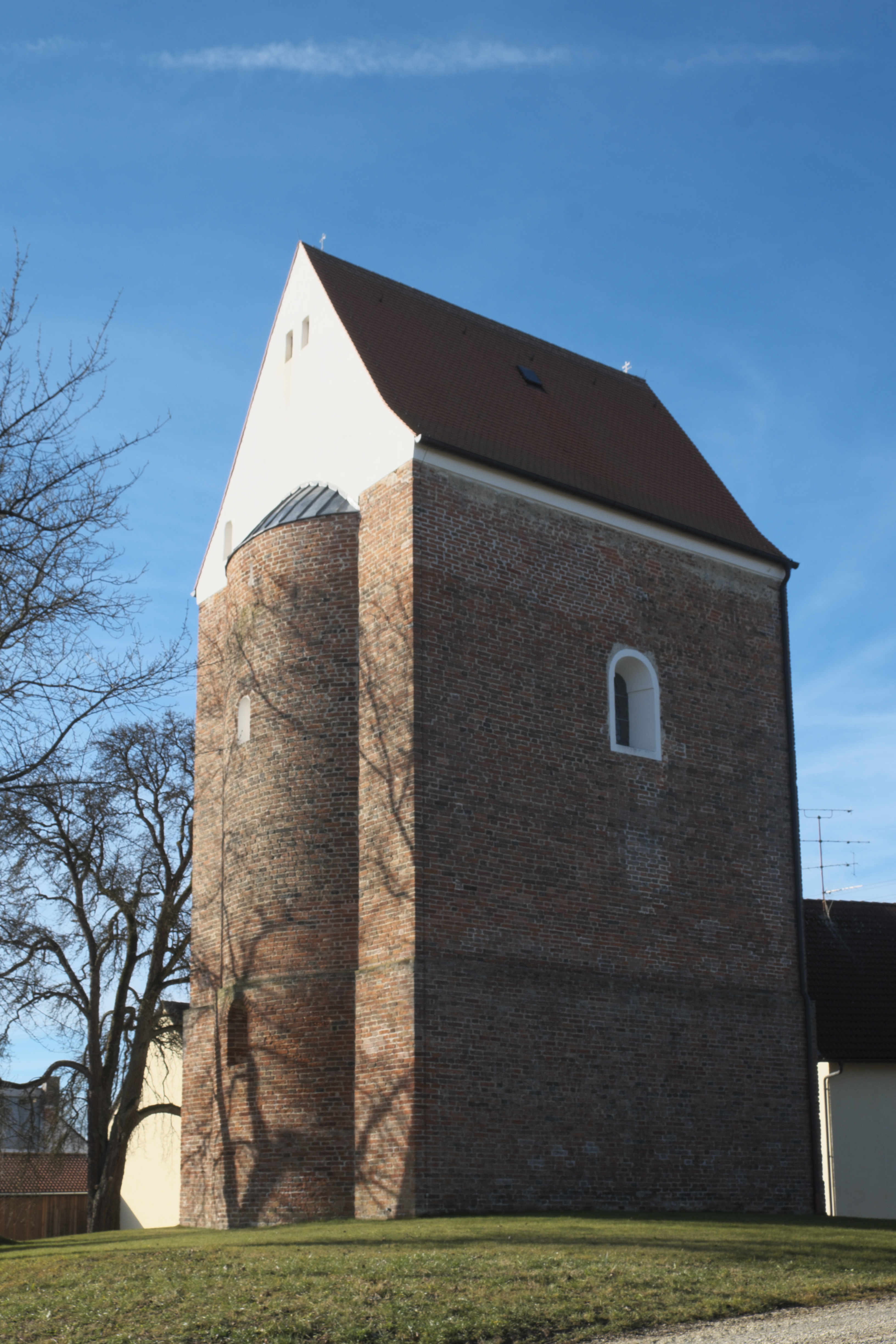 Katholische Filialkirche Unsere Liebe Frau in Gasseltshausen (Aiglsbach) im niederbayerischen Landkreis Kelheim (Bayern/Deutschland)